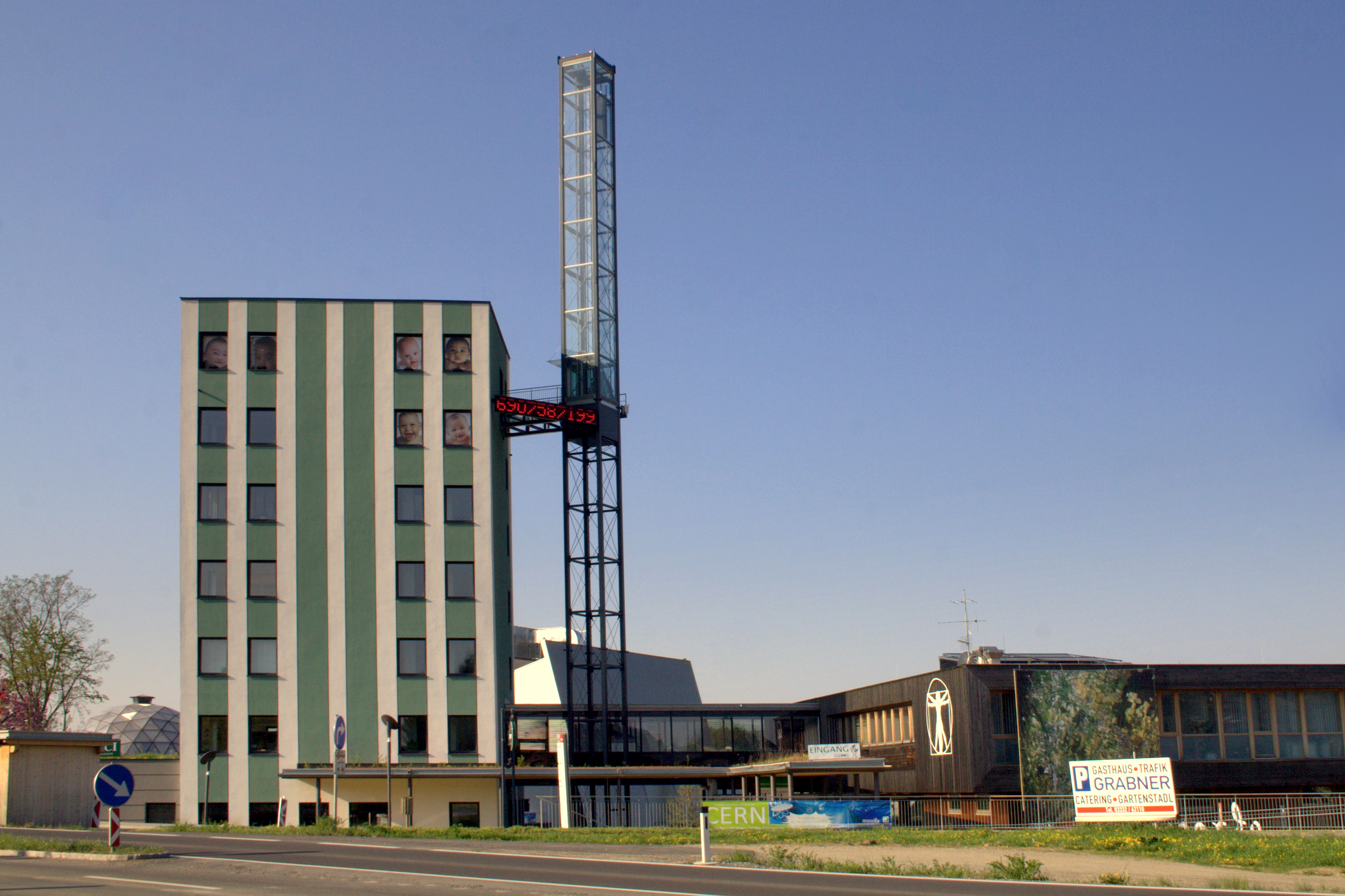 Weltblicklift im Ökopark in Hartberg. Ehemaliger Marienlift in Graz